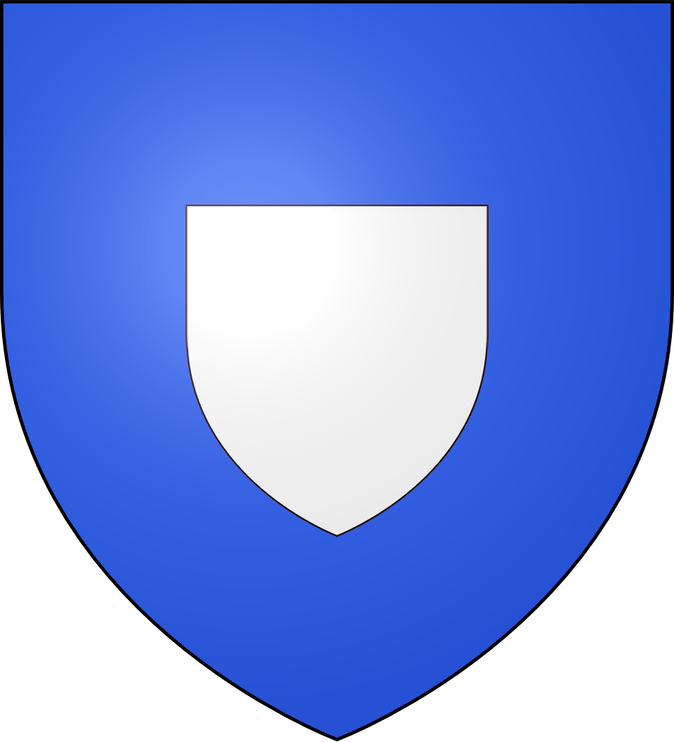 Blason de la ville de Ramburelles (Somme) : D'azur à l'écusson d'argent